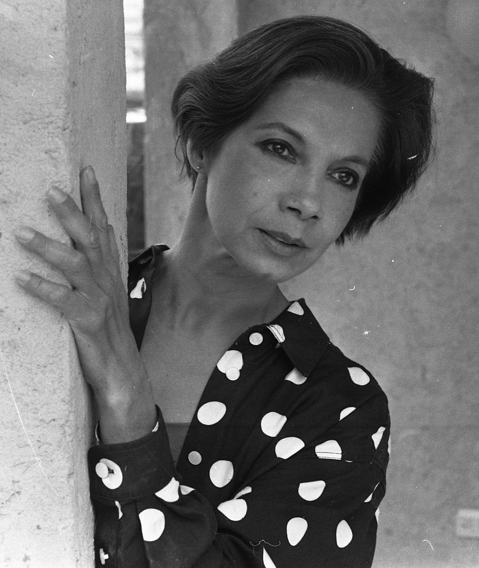 Rosenda Monteros (a Mexican actress)